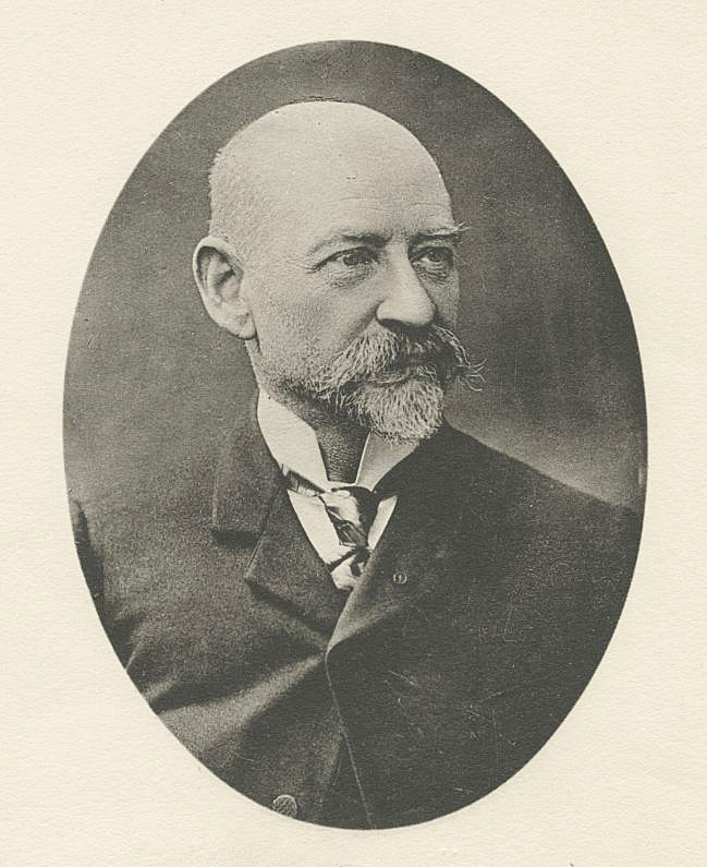 Charles Bayet